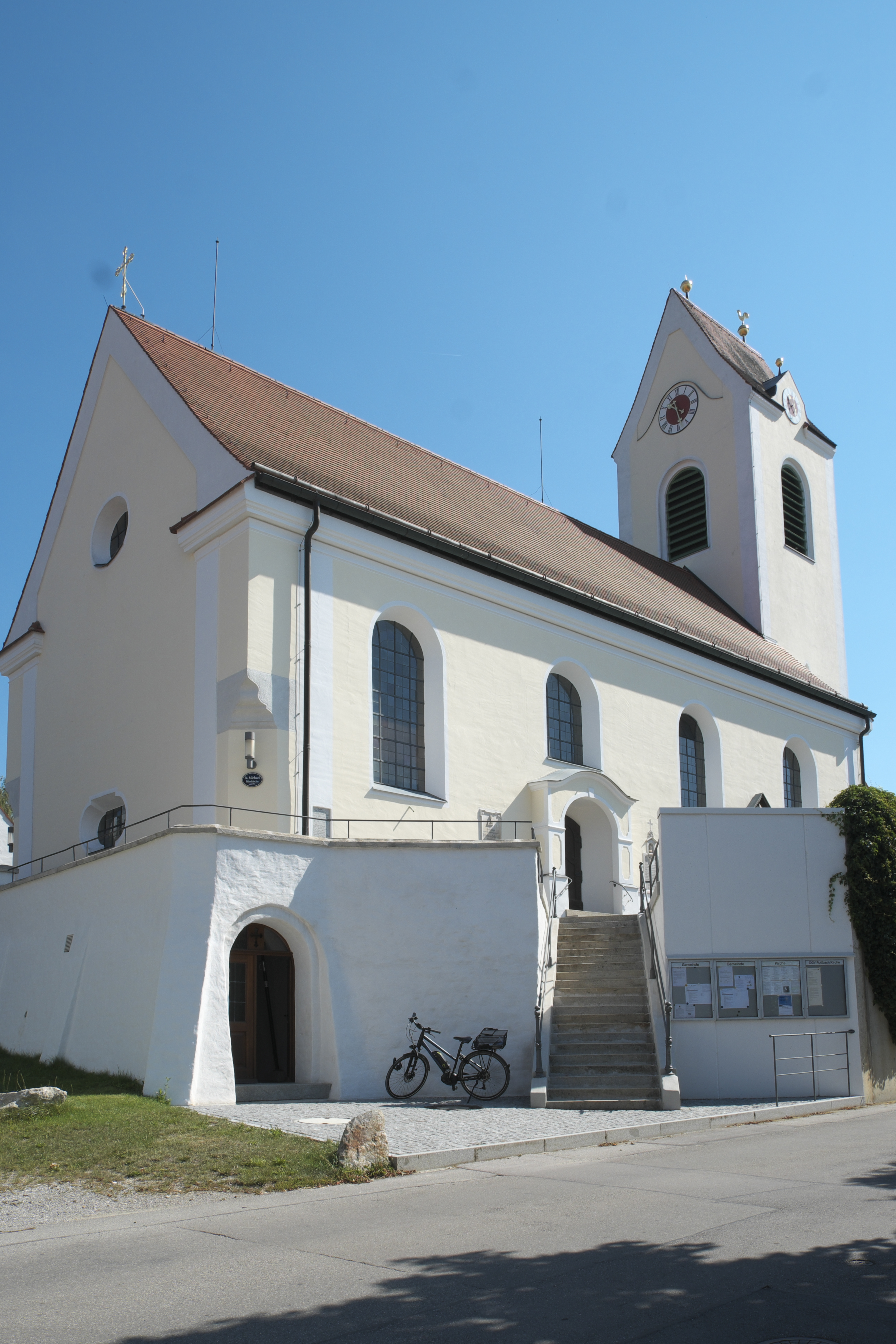 Katholische Pfarrkirche St. Michael in Rottbach (Maisach) im oberbayerischen Landkreis Fürstenfeldbruck (Bayern/Deutschland)